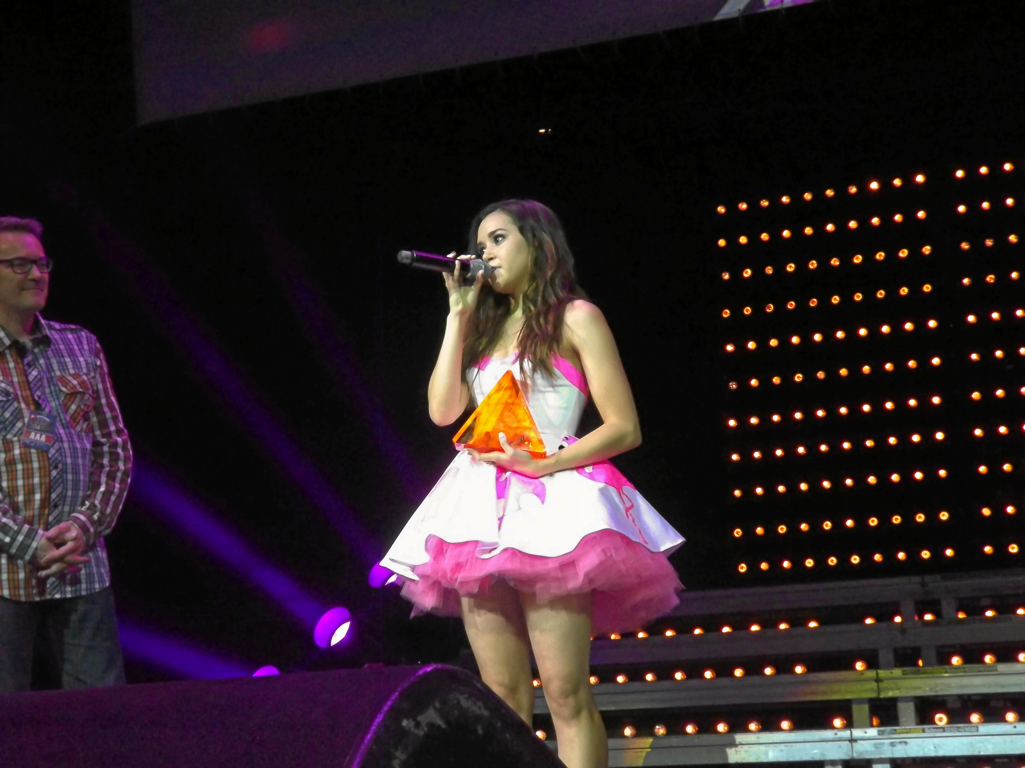 Megan Nicole mit einem Playaward bei den Videodays